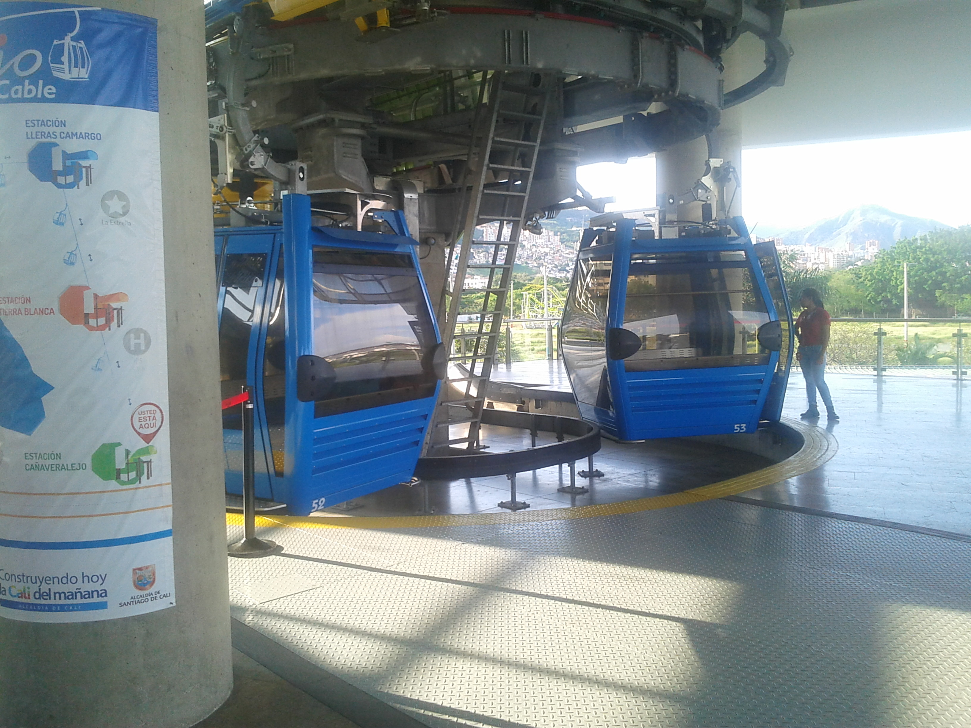 Cabinas del MIO Cable en la estación Cañaveralejo